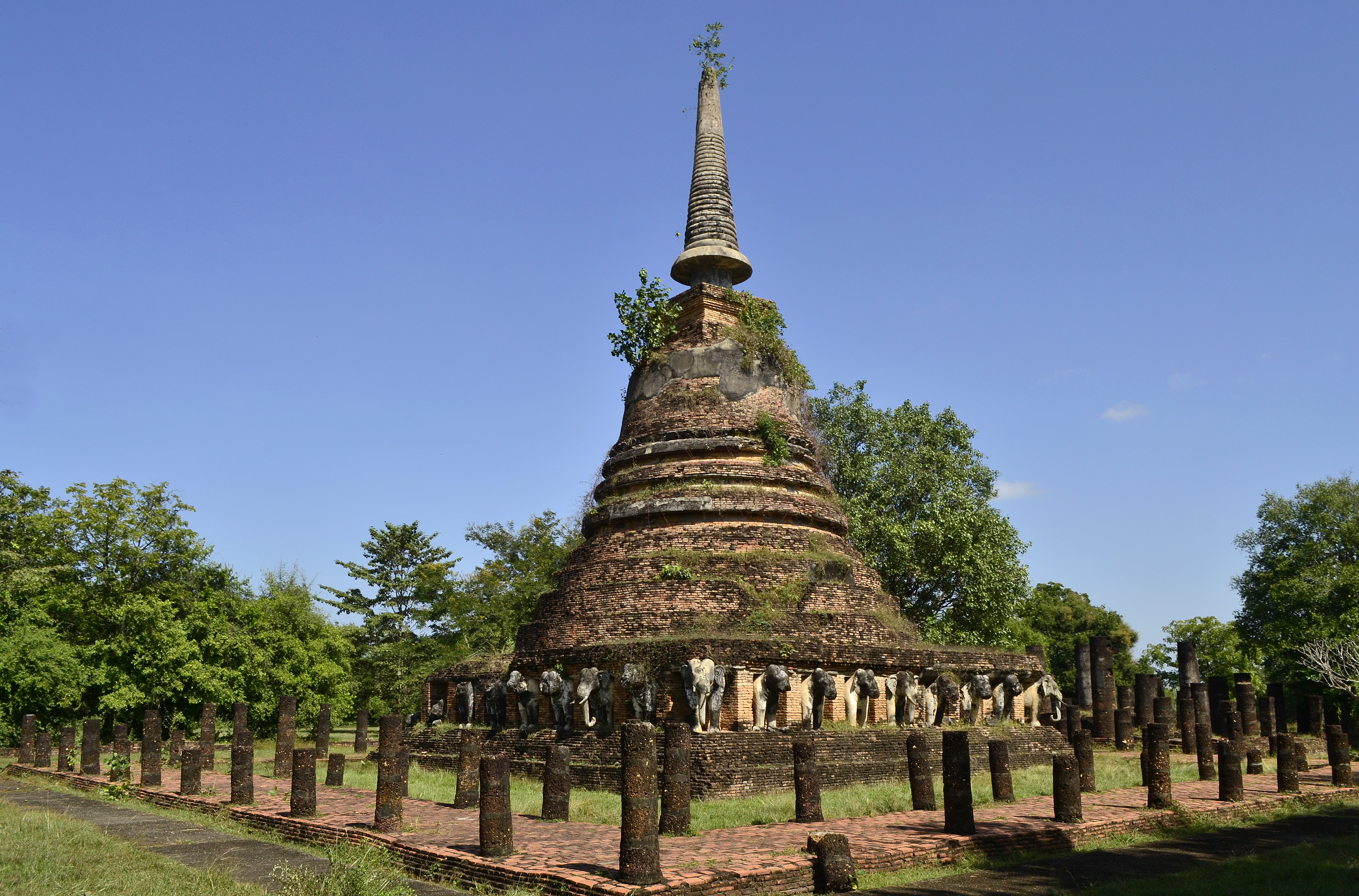 Wat Chang Lom im Geschichtspark Sukhothai